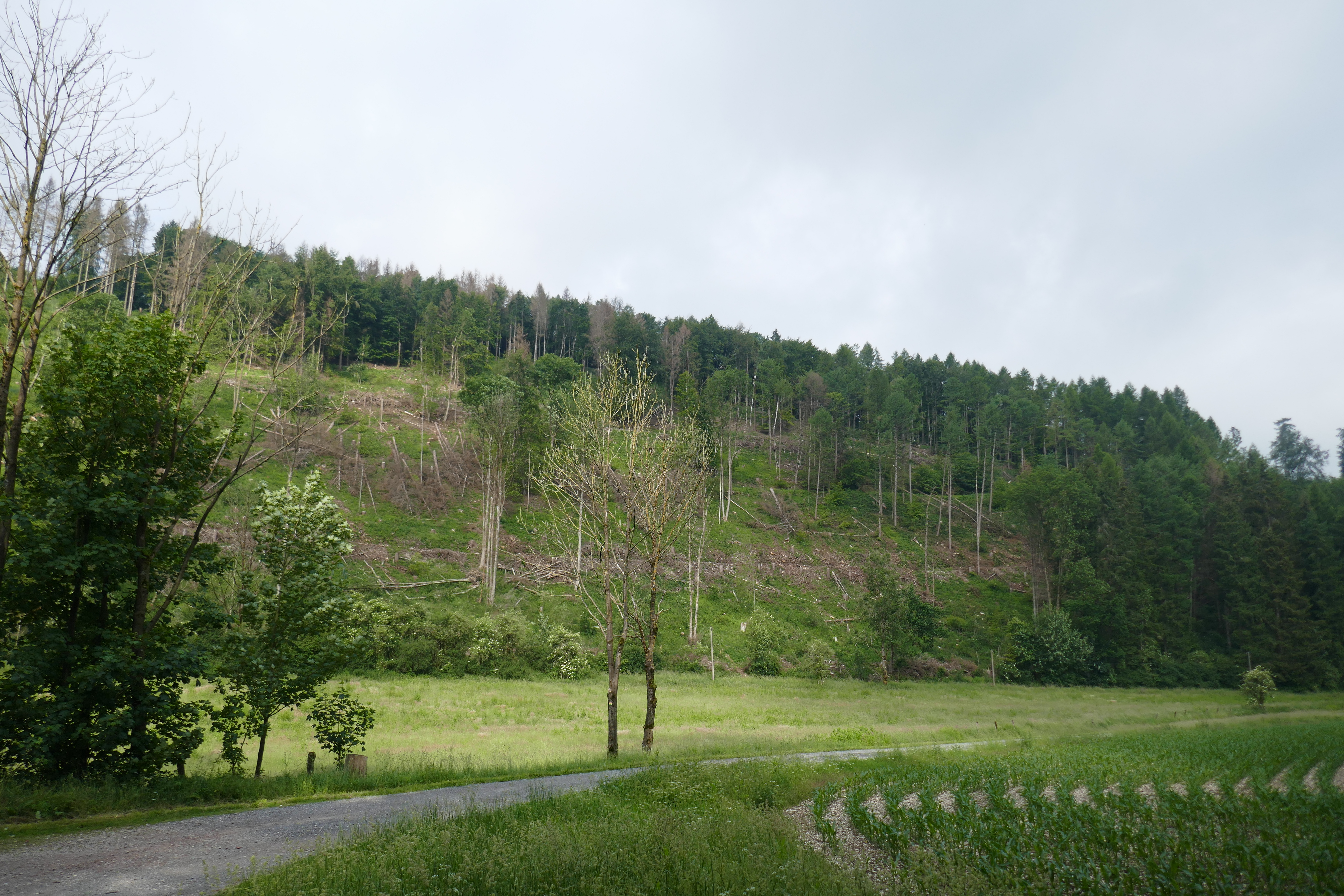 Dunetal bei Neuenbeken, Fichtensterben im Paderborner Stadtwald